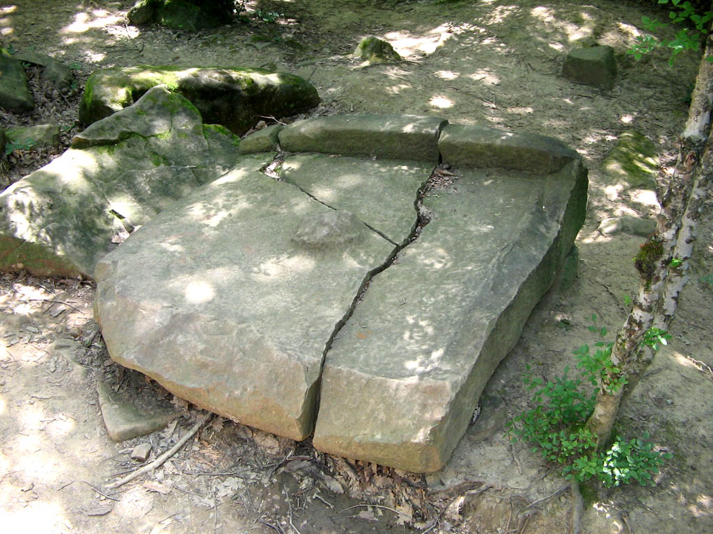 Развал ложнопортального дольмена с имитацией вставленной пробки на фронтонной плите. Долина реки Жане.